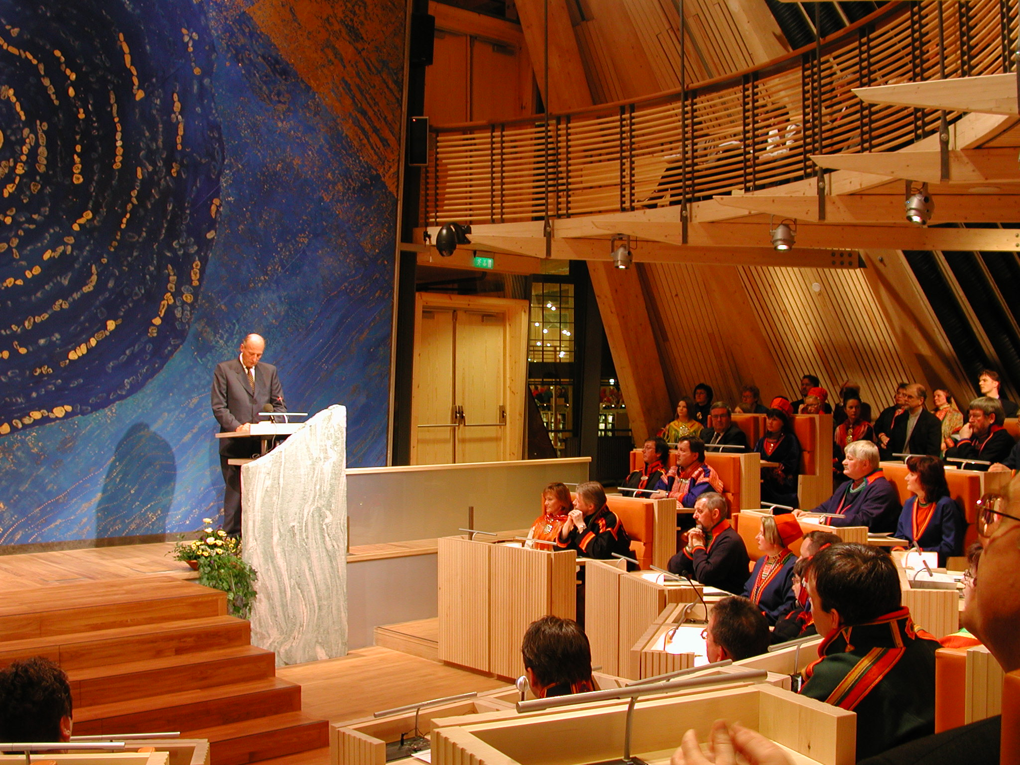 Kongen taler i forbindelse med åpningen av Sametingsbygningen i 2000. Foto: Sametinget.